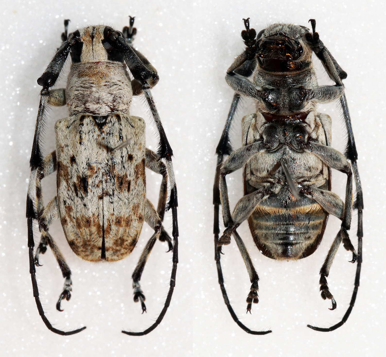 Pascoe,1866 Sex: Male Data: 04-03-14 - Kuamut - Sabah - Malaysia Size: ?